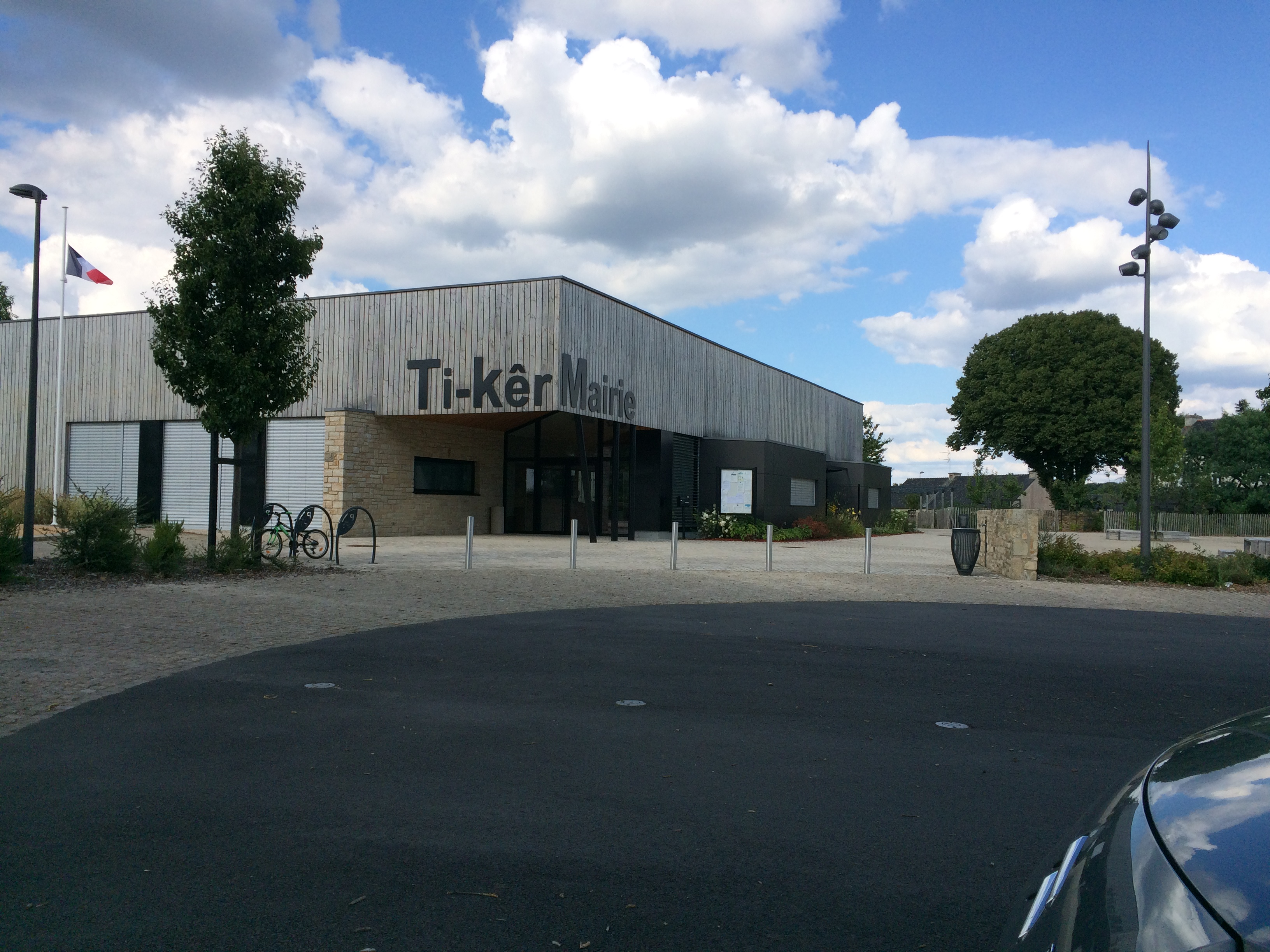 Photographie du village de Lauzach, Morbihan, France : mairie